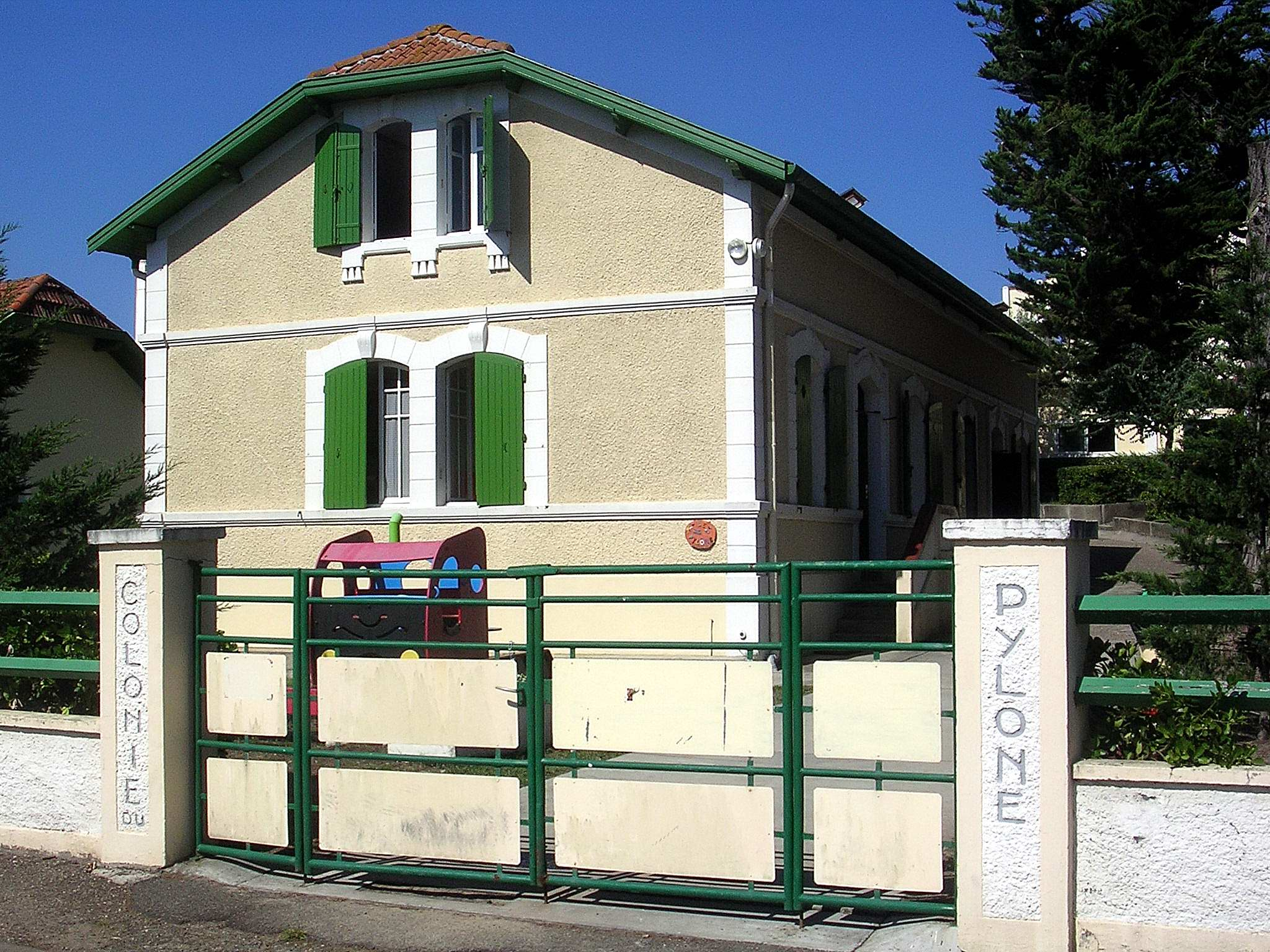 Mimizan-Plage, colonie du Pylone